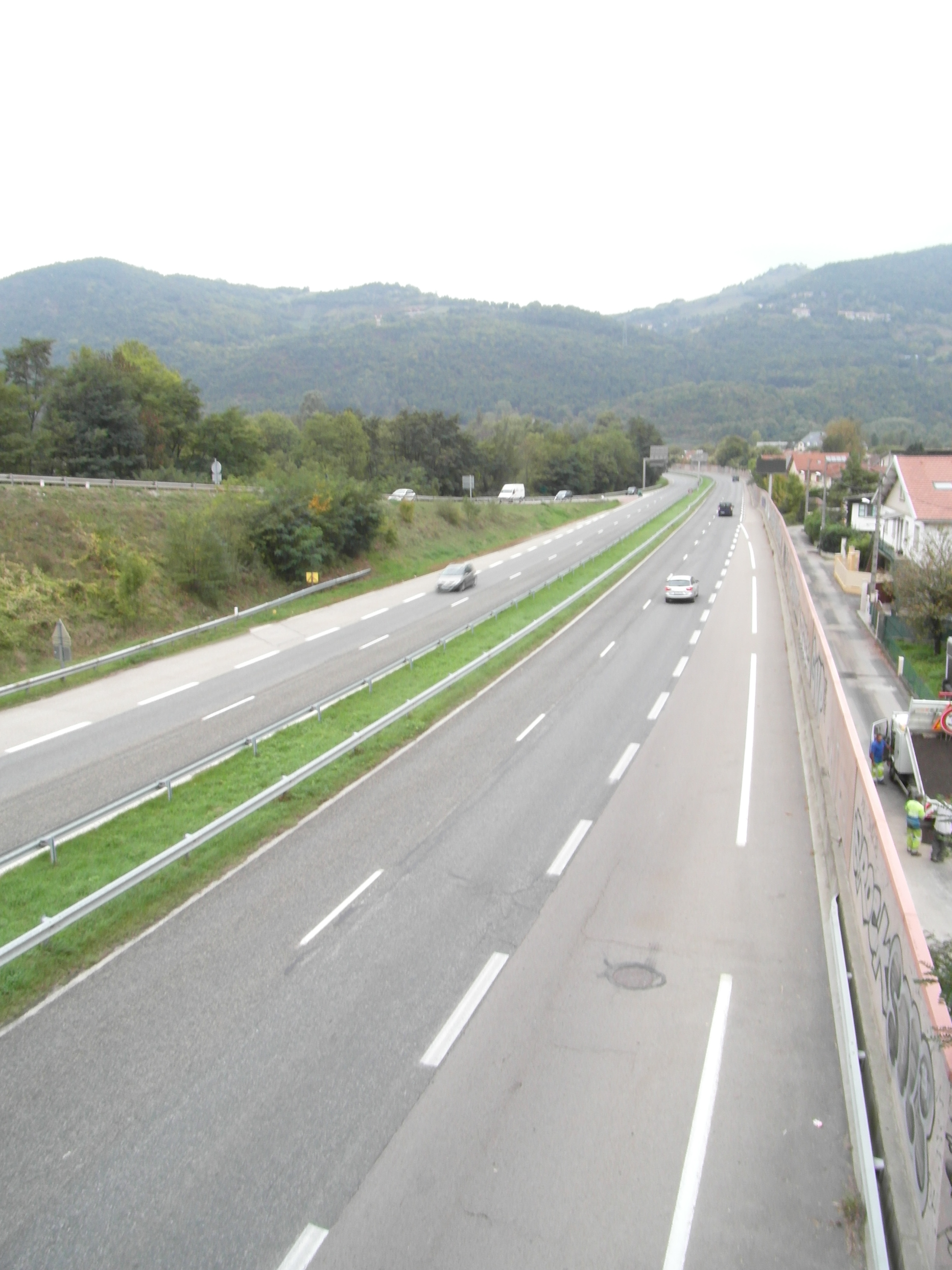 Déviation RN91